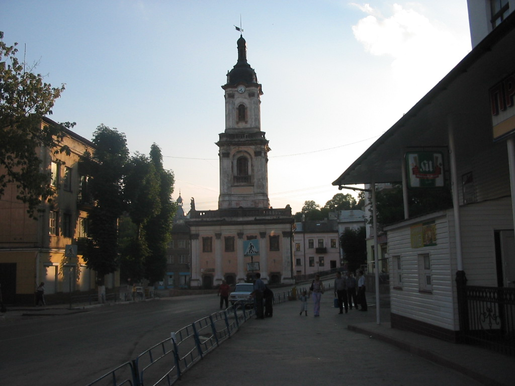 Buchach, western Ukraine